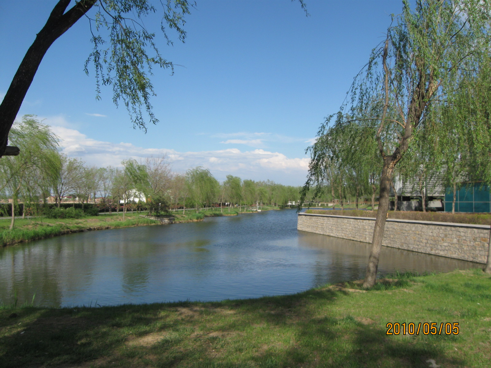 Haidian, Beijing, China